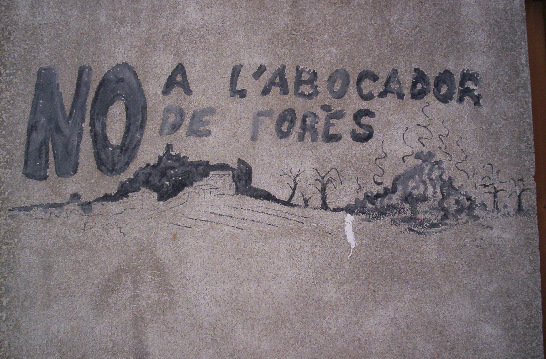 Pintada a la bàscula de Forès referida a la protesta contra el Pla de residus de 1990